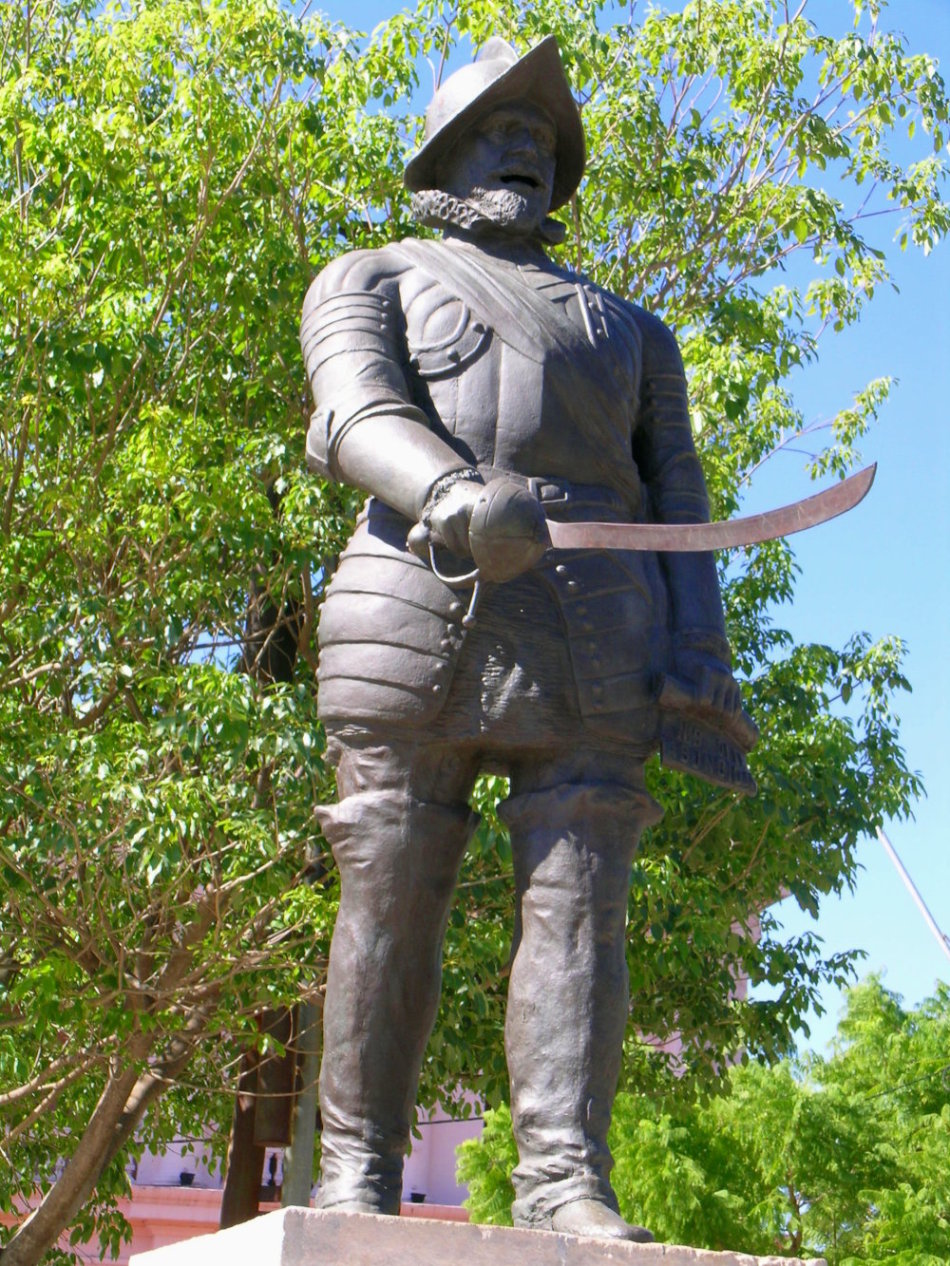 Juan de Salazar y Espinoza